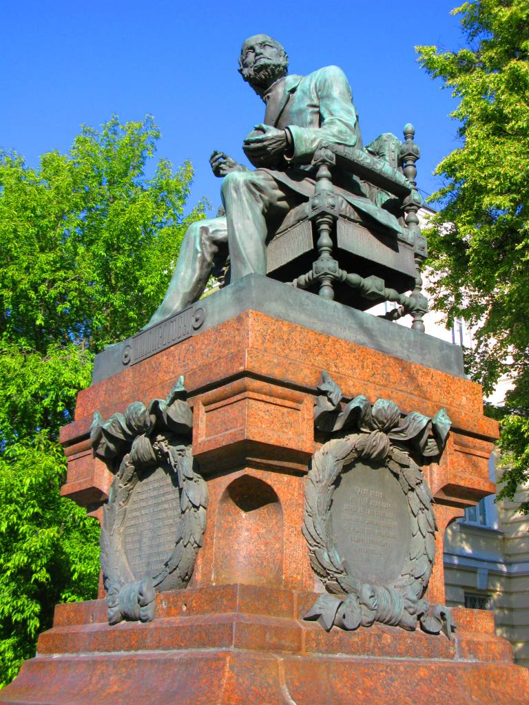 Памятник Пирогову на Б.Пироговская ул., Moscow, Russia.